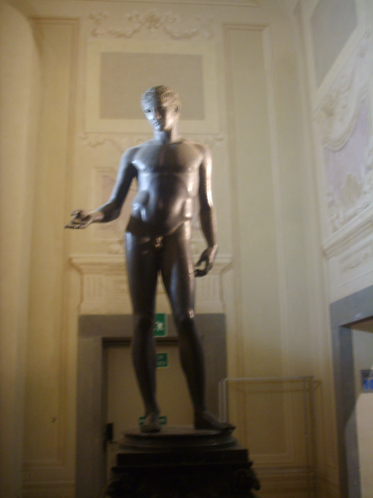 Idolino_di_Pesaro Museo_archeologico_di_Firenze museum in Florence